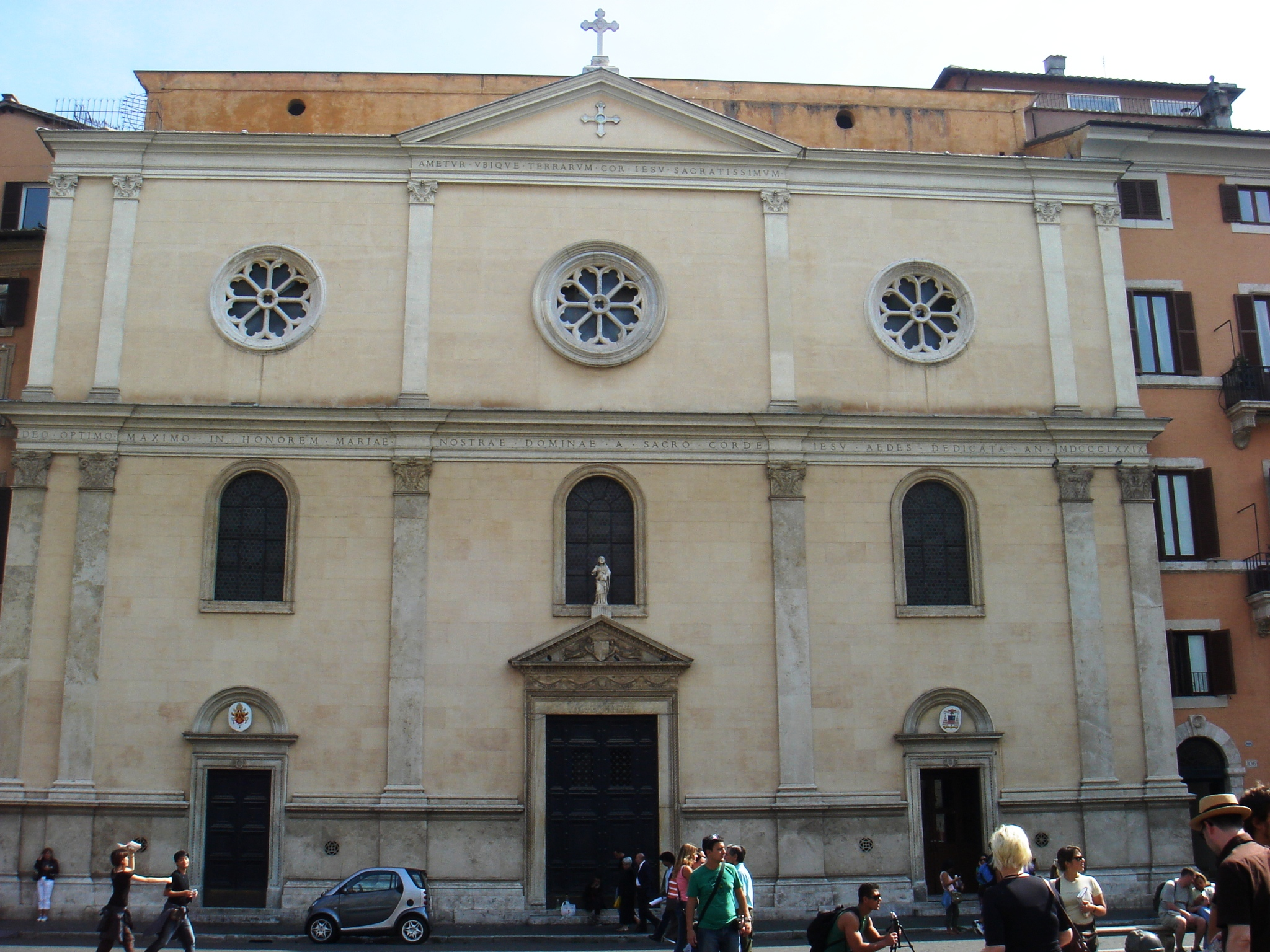 Roma, piazza Navona: Nostra Signora del Sacro Cuore (già san Giacomo degli Spagnoli)